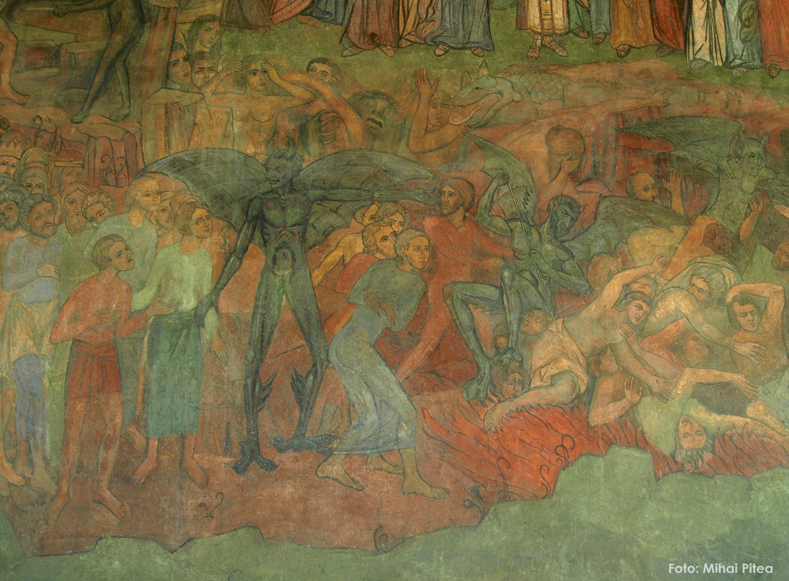 Catedrala Patriarhală "Sf. Împărați Constantin și Elena". A se vedea Vulcănescu (1992), Nae Ionescu, Editura Humanitas 01